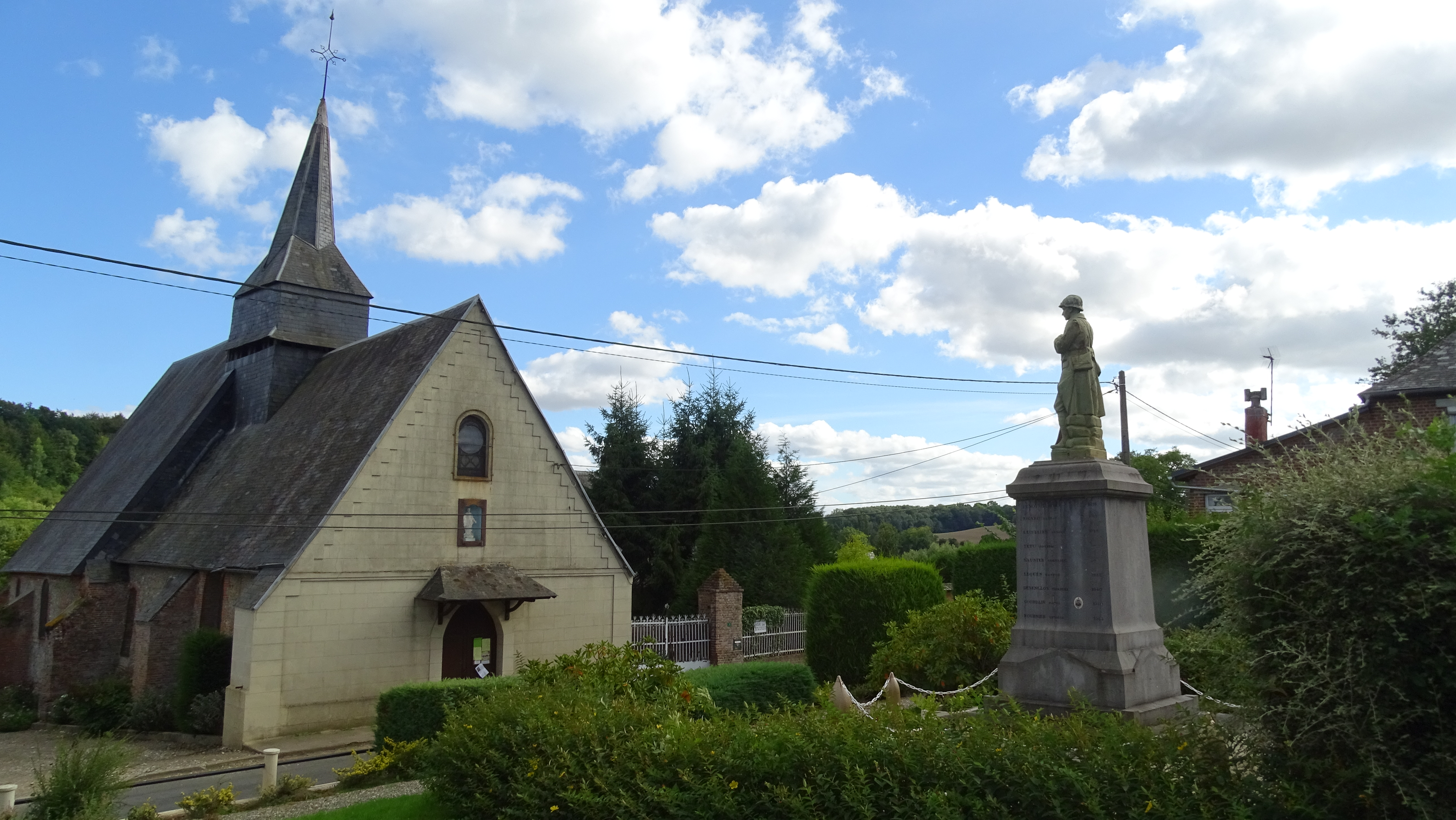 Façade